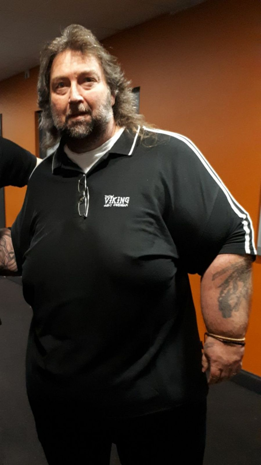 Andy Fordham op Dutch Open 2018